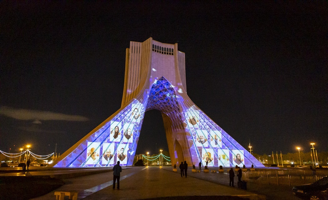 جهان در آزادی